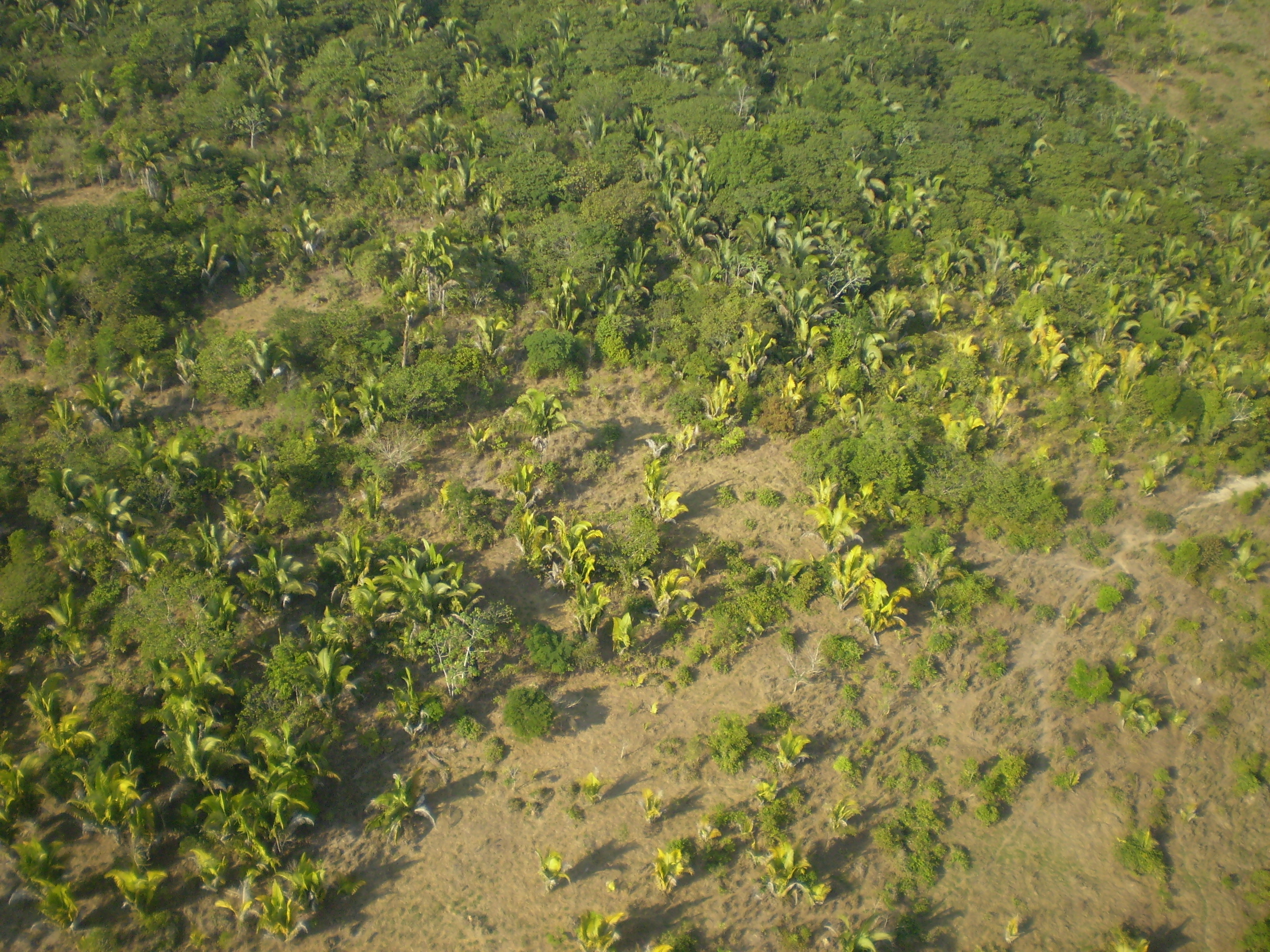 Sere de transição em antigo pasto (sucessão secundária)na floresta amazônica